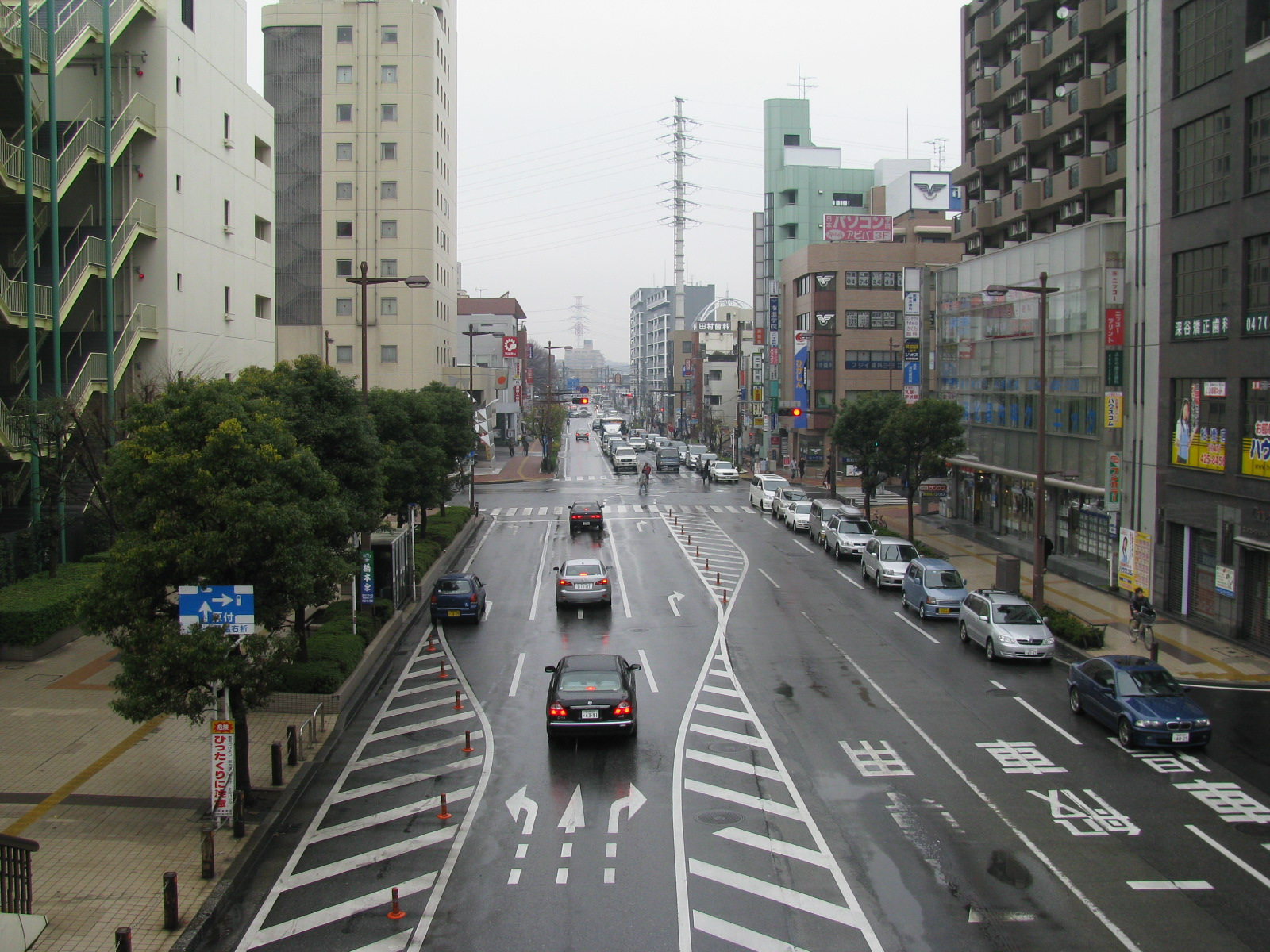 JR船橋駅